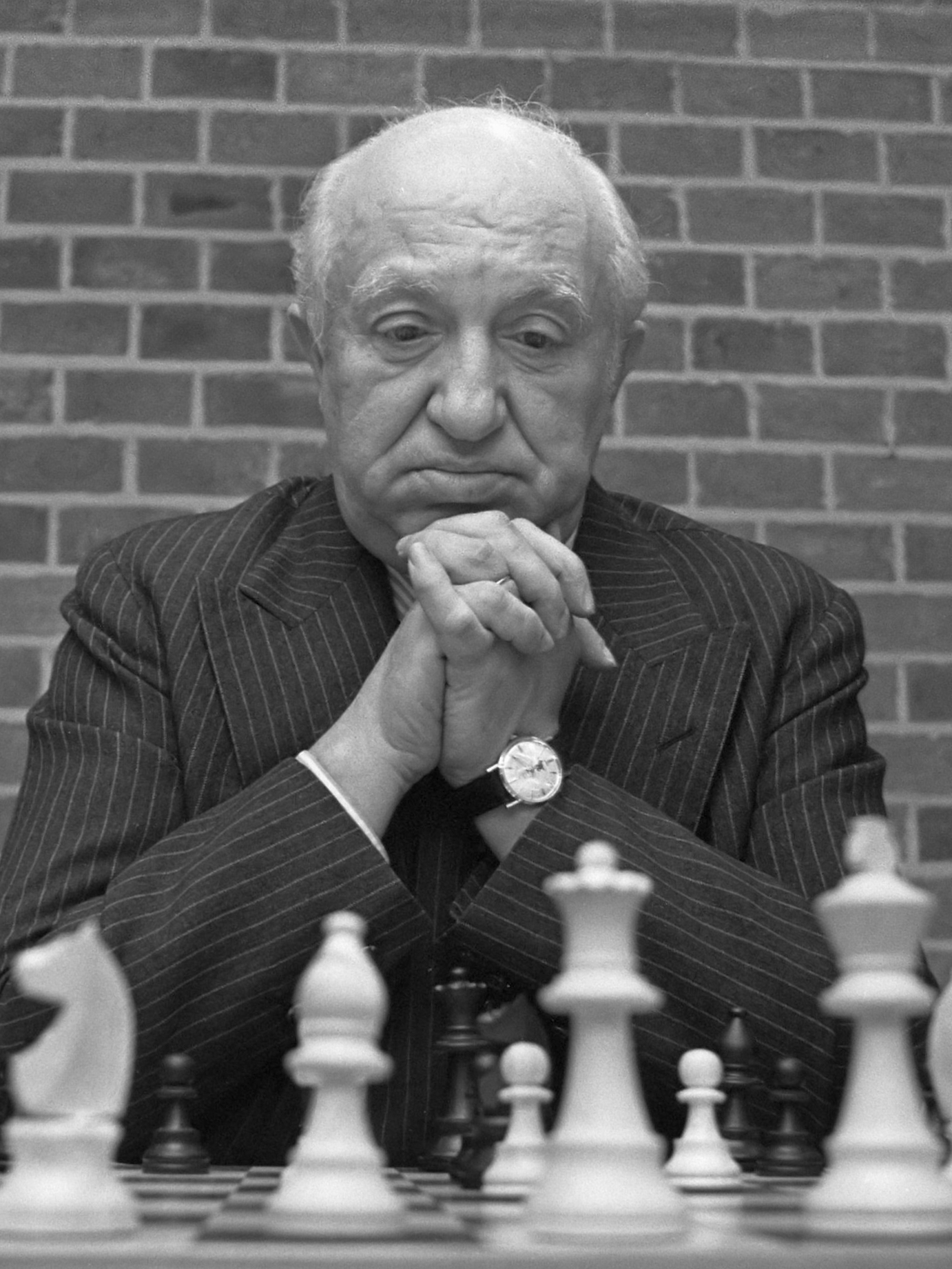 Hoogoven-schaaktoernooi Wijk aan Zee , nummer 7 Najdorf 24 januari 1973